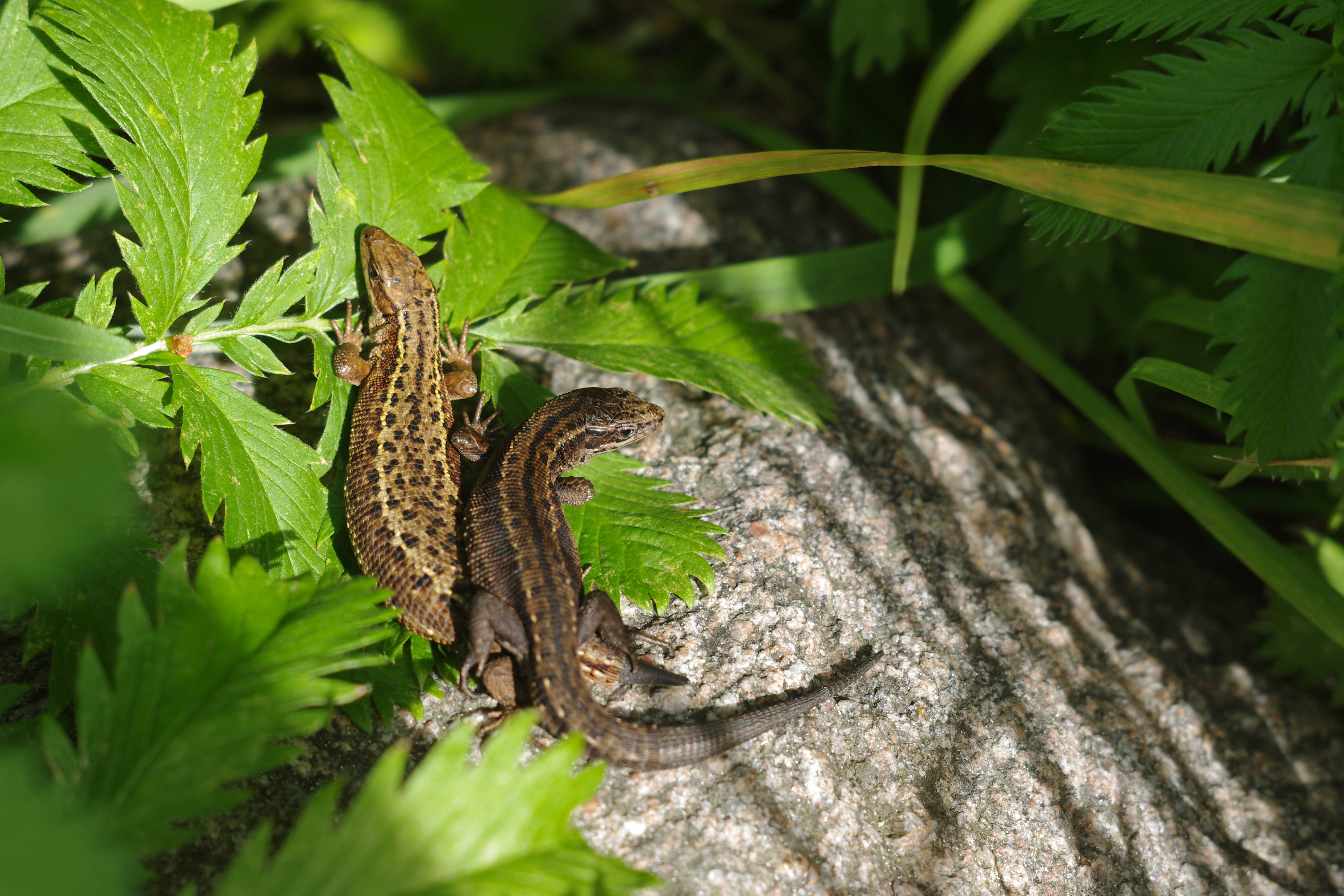 Arusisalikud